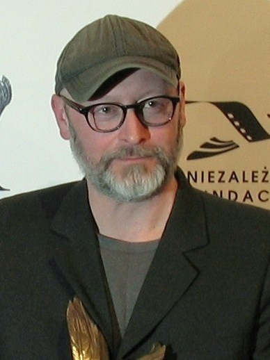 Wojciech Smarzowski, reżyser i scenarzysta.